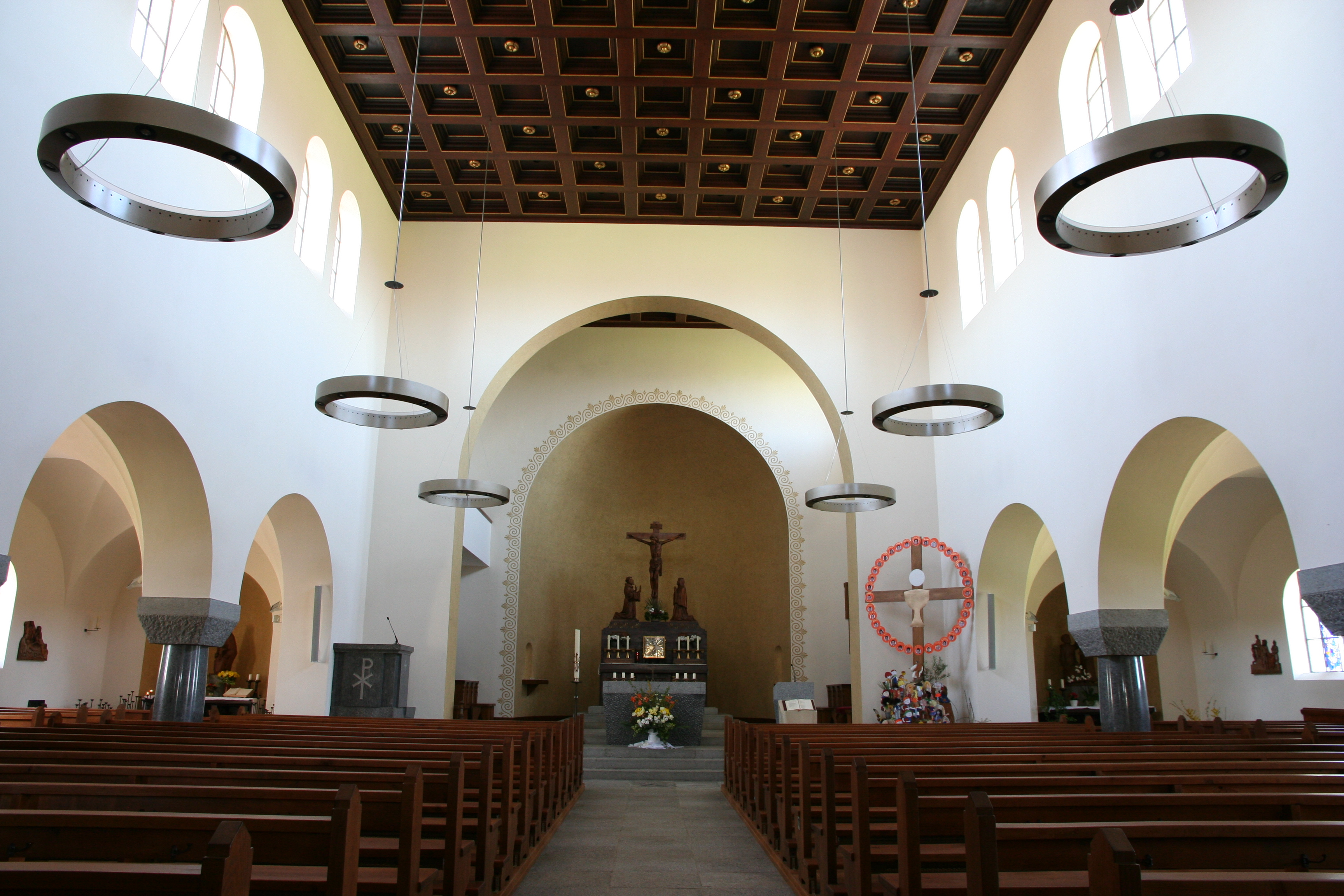 Römisch-katholische Pfarrkirche St. Franziskus Wetzikon